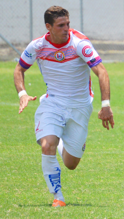 Ándres Justicia en U.T. Cotopaxi - 2014